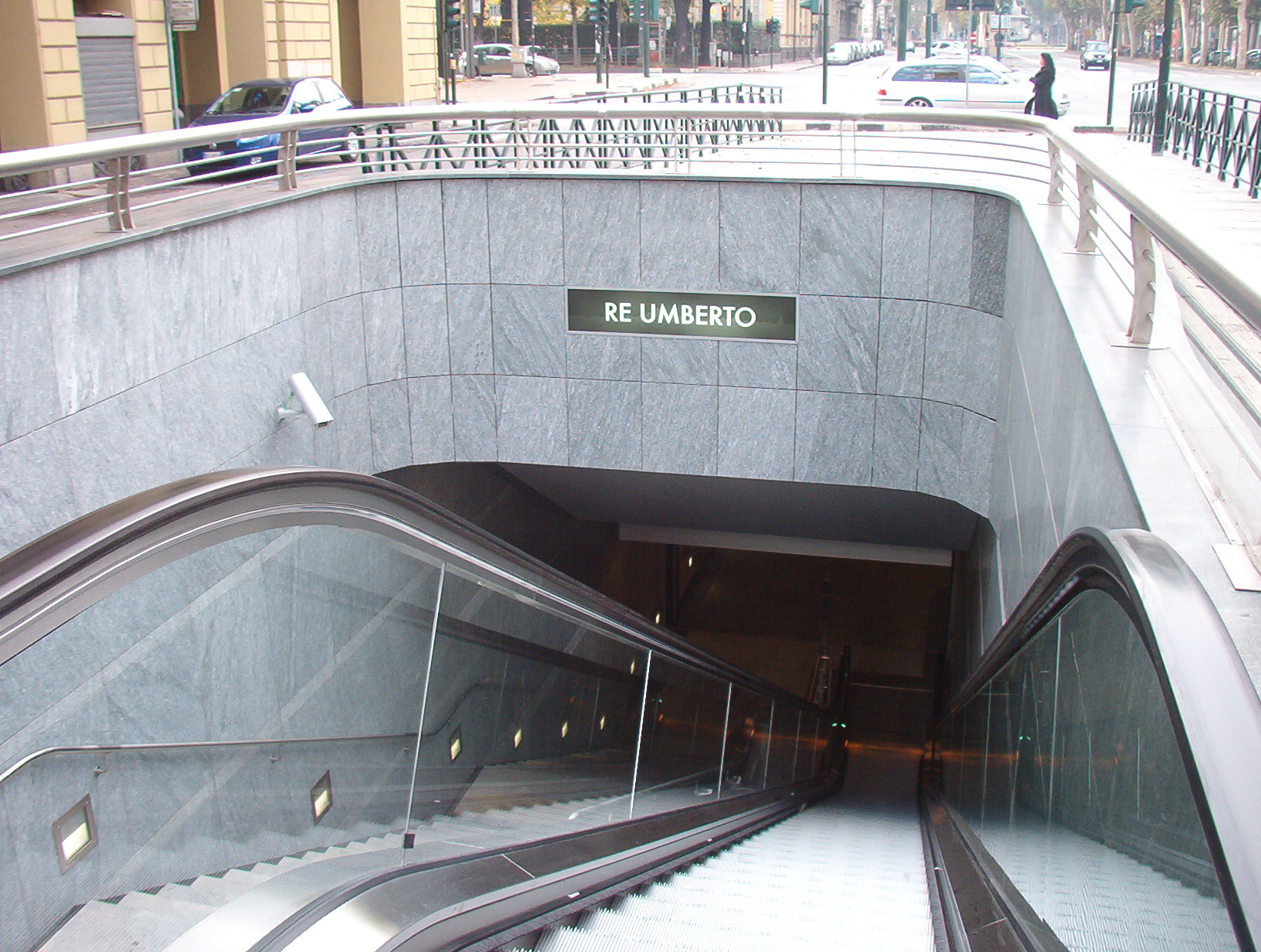 Accesso alla fermata Re Umberto della metropolitana di Torino - Italy